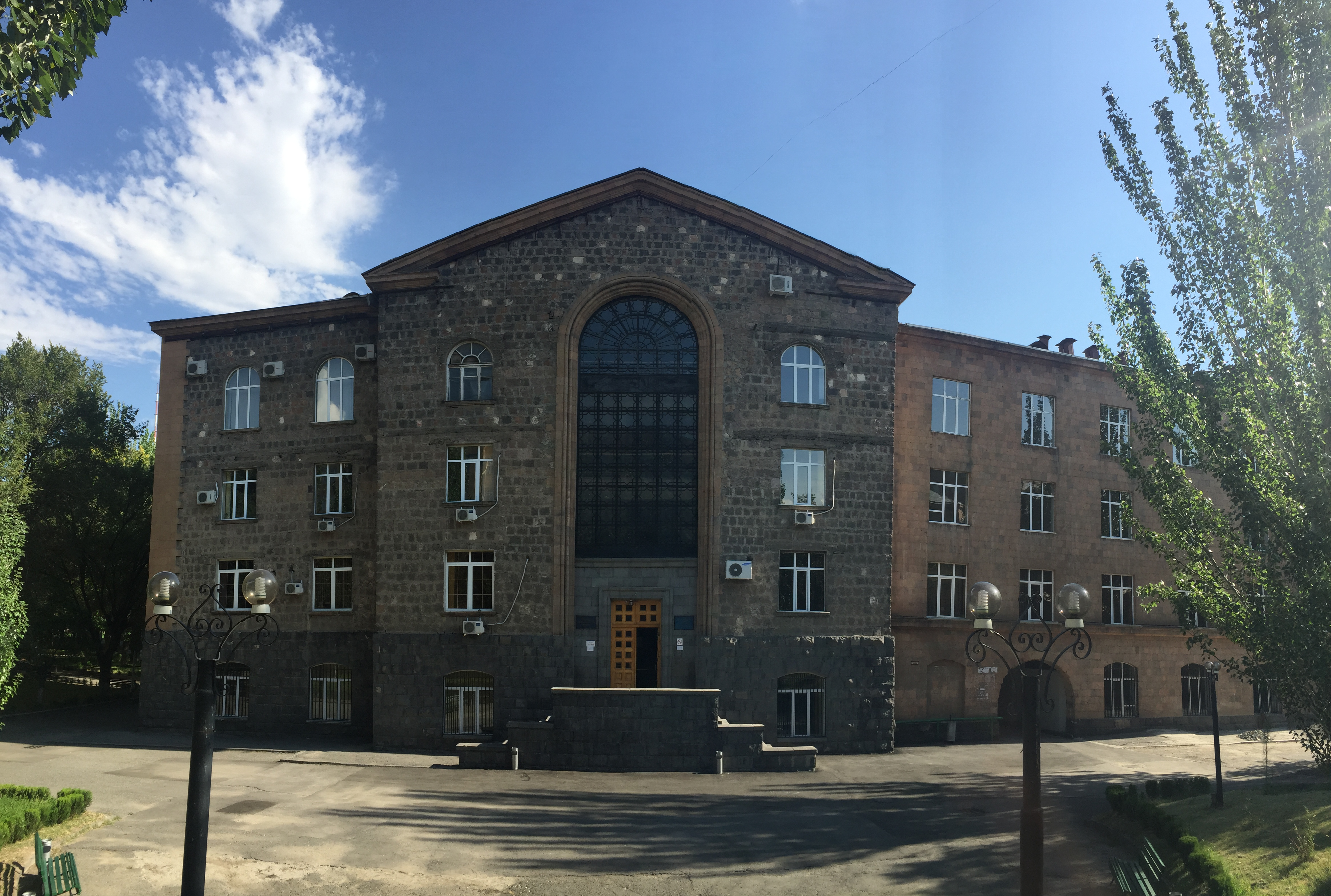 ԵՊՀ իրավագիտության ֆակուլտետի շենքը